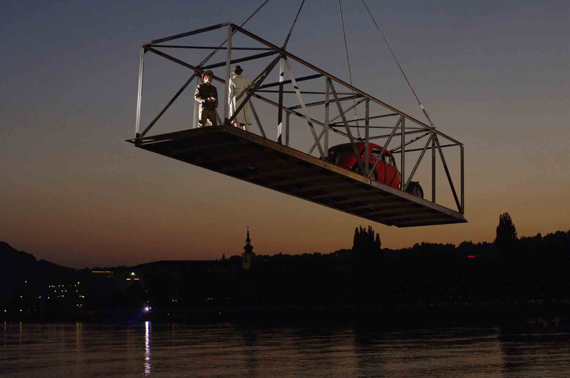 Teilung am Fluss